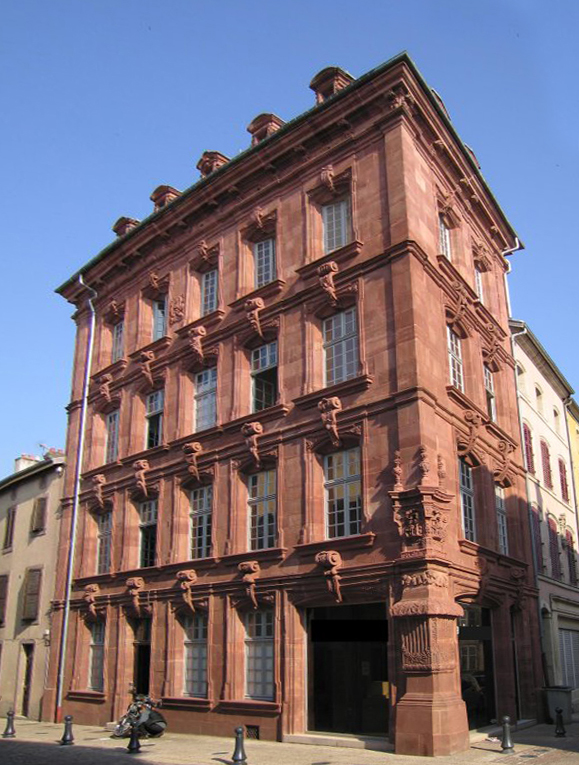 « Maison du Marchand », à Lunéville, construite au XVIIIe siècle en grès rose, classée monument historique.